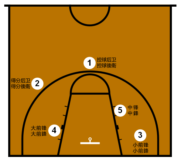 篮球位置示意图。